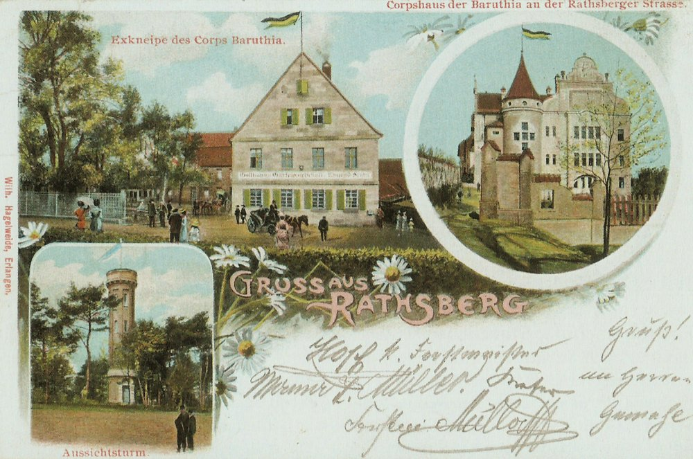 Exkneipe des Corps Baruthia in Atzelsberg und Aussichtsturm in Rathsberg sowie das Corpshaus in der Rathsberger Straße in Erlangen